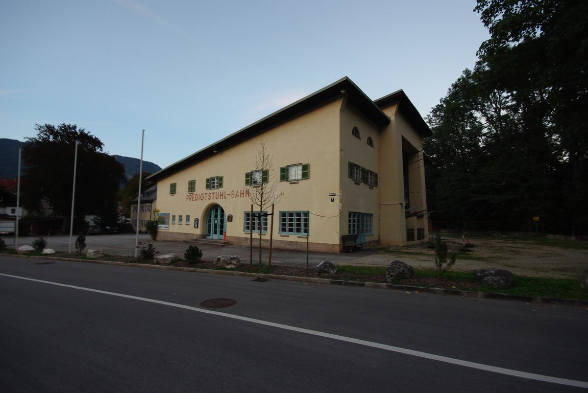 Südtiroler Platz 1, 83435 Bad Reichenhall, Talstation der PredigtstuhlbahnThis is a photograph of an architectural monument.